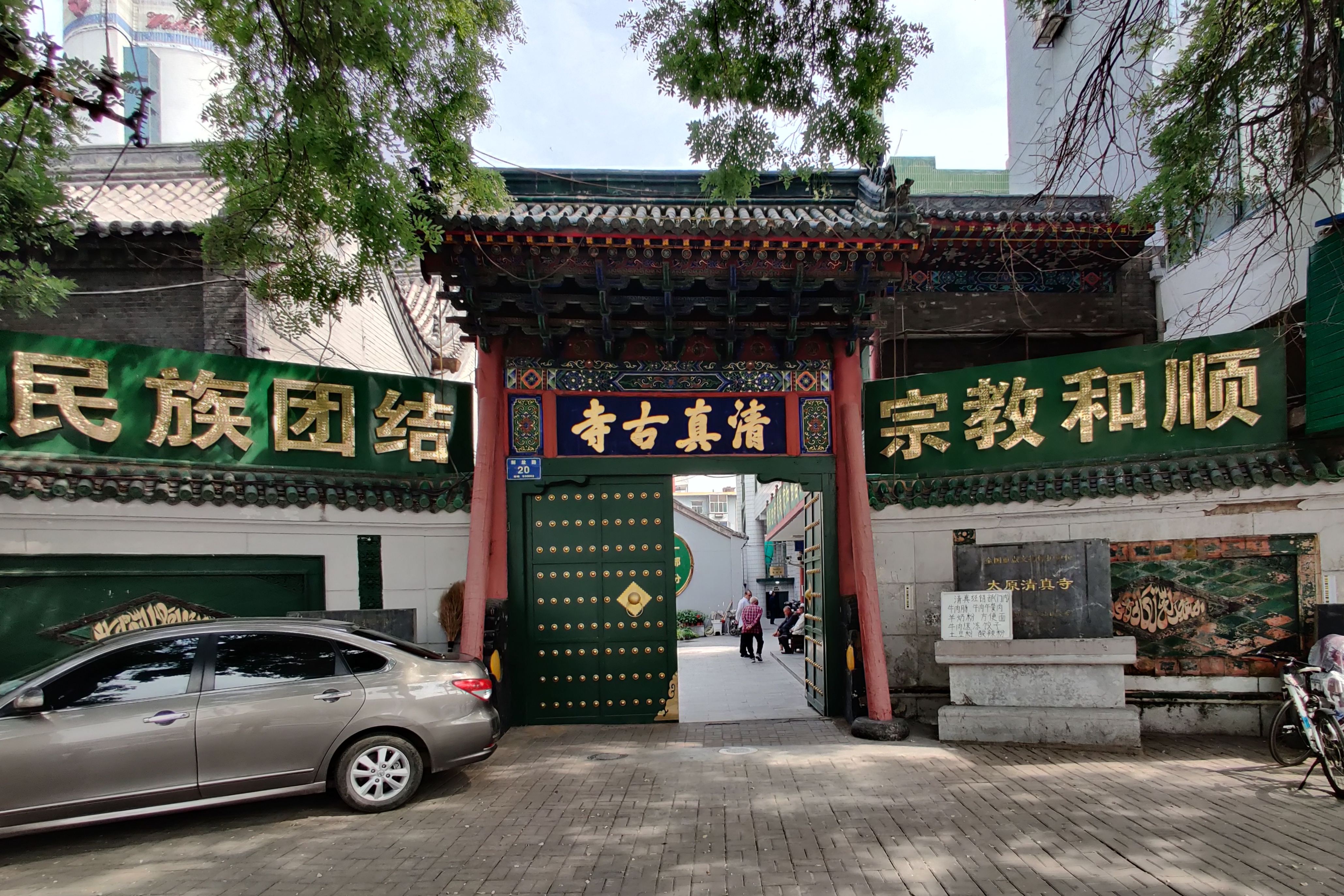 中文（中国大陆）: 太原清真寺 大门